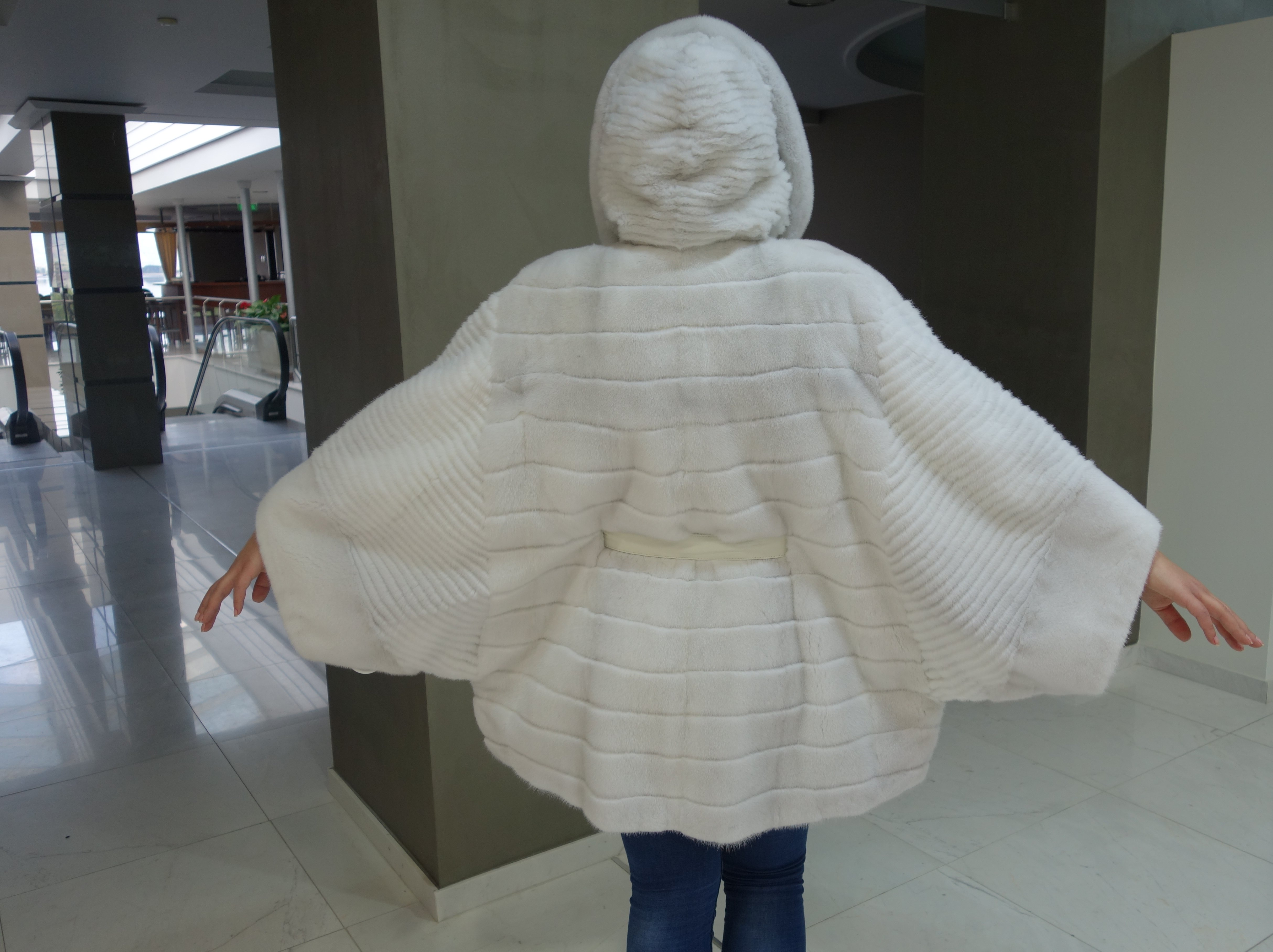 Azurene Nerz-Capejacke mit Galons, Rückenansicht. Firma Marco Varni, Pelz-Großhändler und -Einzelhändler in der Präfektur Kastoria, Mazedonen, Griechenland mit Haupthäusern in den Orten Dispilio (Fashion Center mit Showrooms) und Dispilio (Werkstätten).